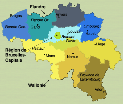 adaptée de l'anglais par --flayais 27 fev 2005 à 13:52 (CET)